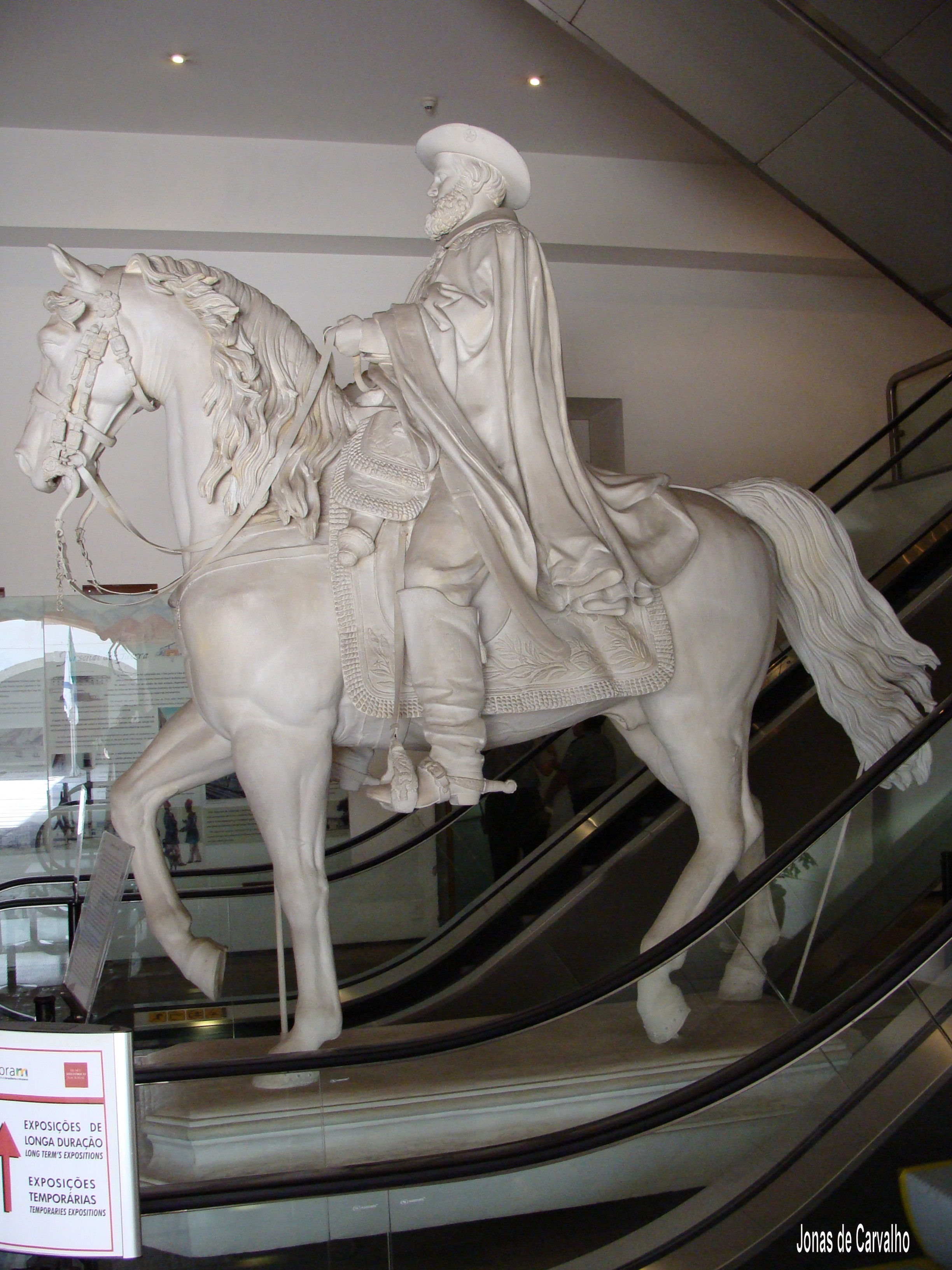 Estátua eqüestre de Pedro II Moldada em gesso em 1866, para comemorar a rendição de Uruguaiana em 18 de setembro de 1865, durante a Guerra do Paraguai, a escultura nunca chegou a ser fundida em bronze. Medindo 2,80m de altura e 3,00m de comprimento, a escultura esteve exposta à visitação pública desde a fundação do Museu em 1922 até 1985